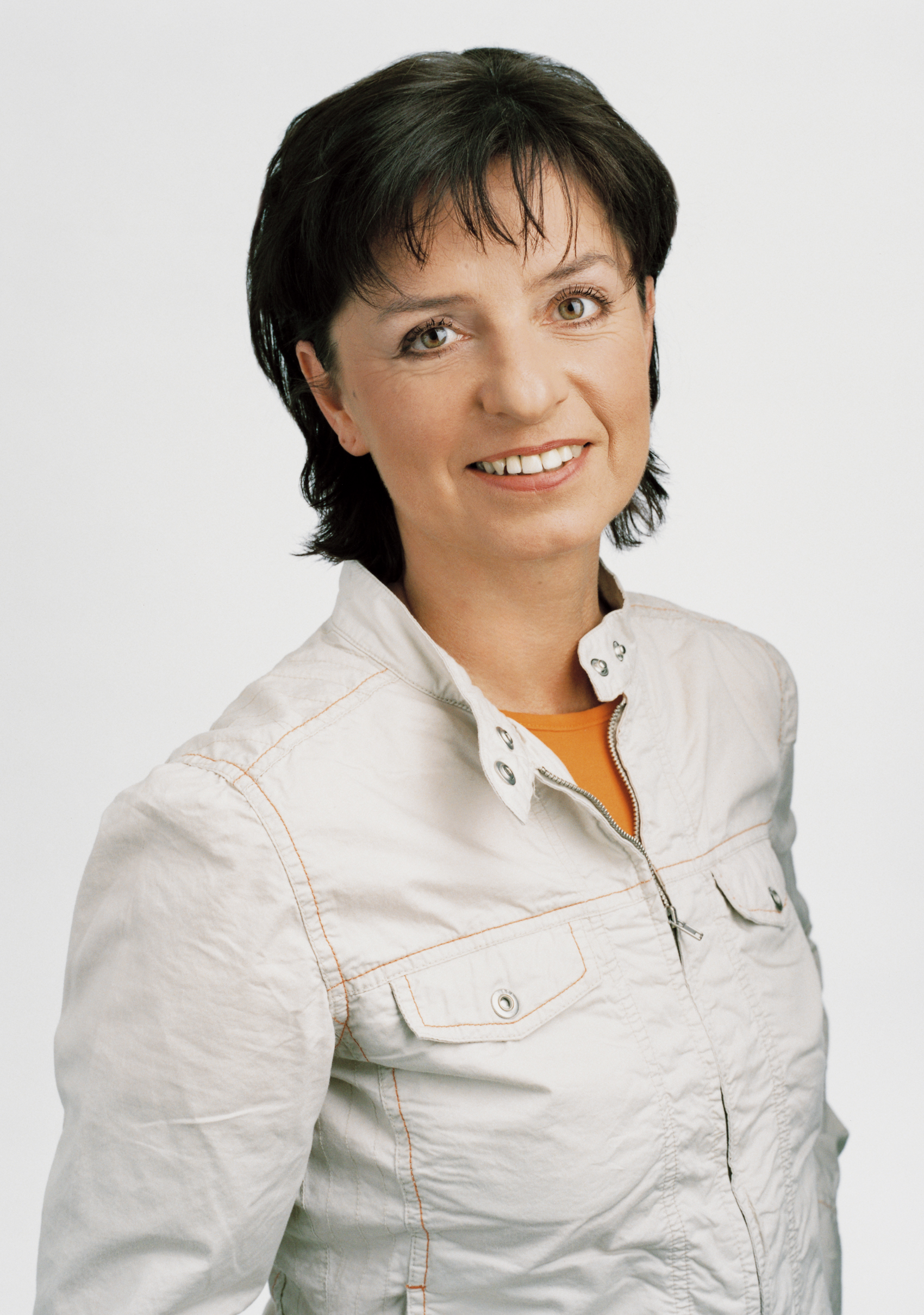 Ingrid Puller. Wiener Landtagsabgeordnete und Mitglied des Wiener Gemeinderats (Die Grünen)